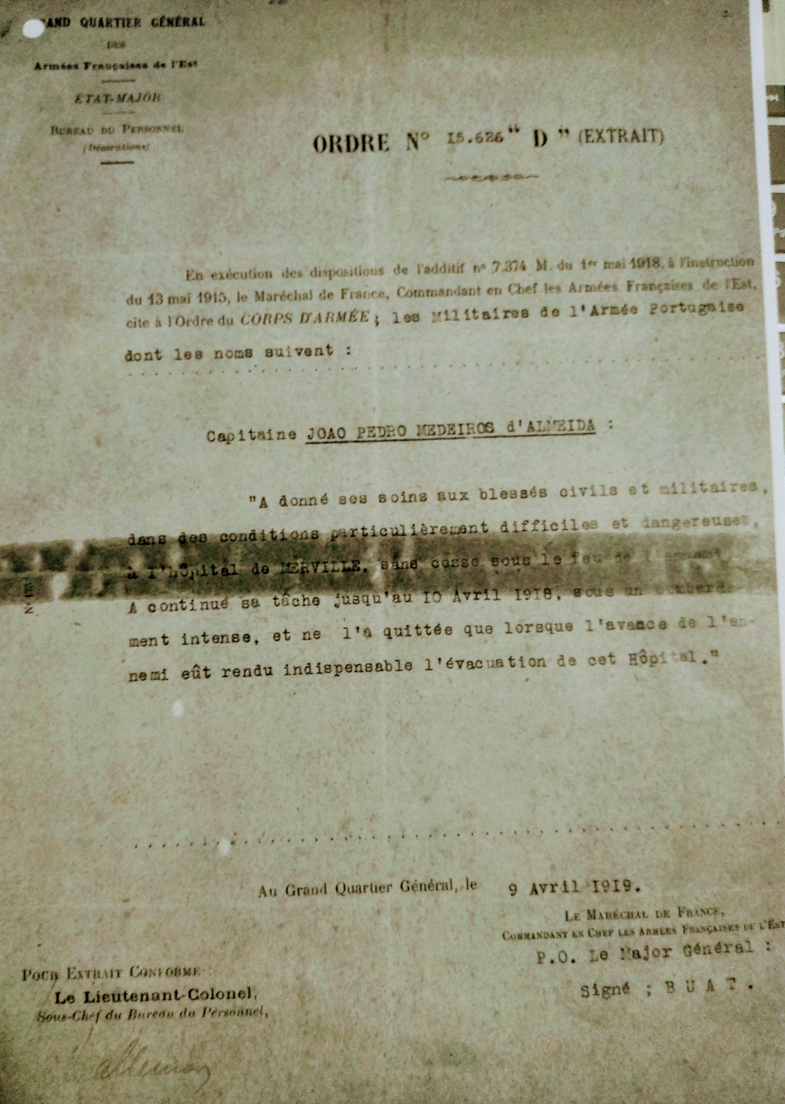 Menção honrosa atribuída a João Pedro Medeiros de Almeida na evacuação do hospital de Merville.